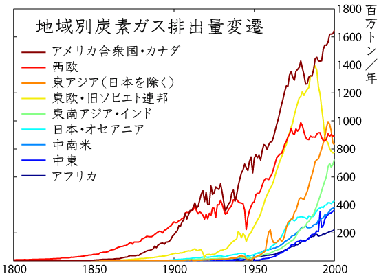 Image:Carbon_Emission_by_Region.png の日本語訳